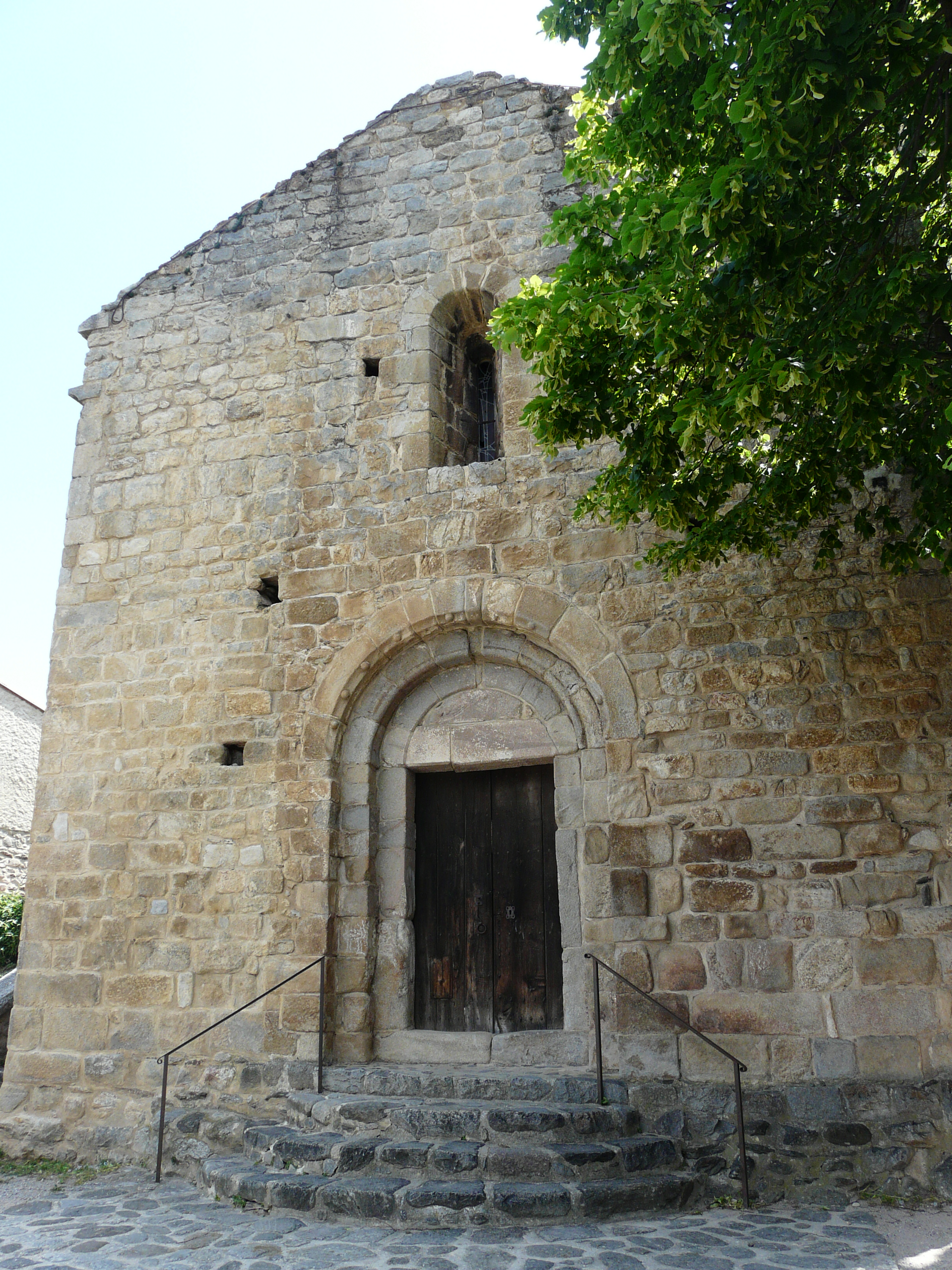 Façana occidental de Sant Feliu de Fillols